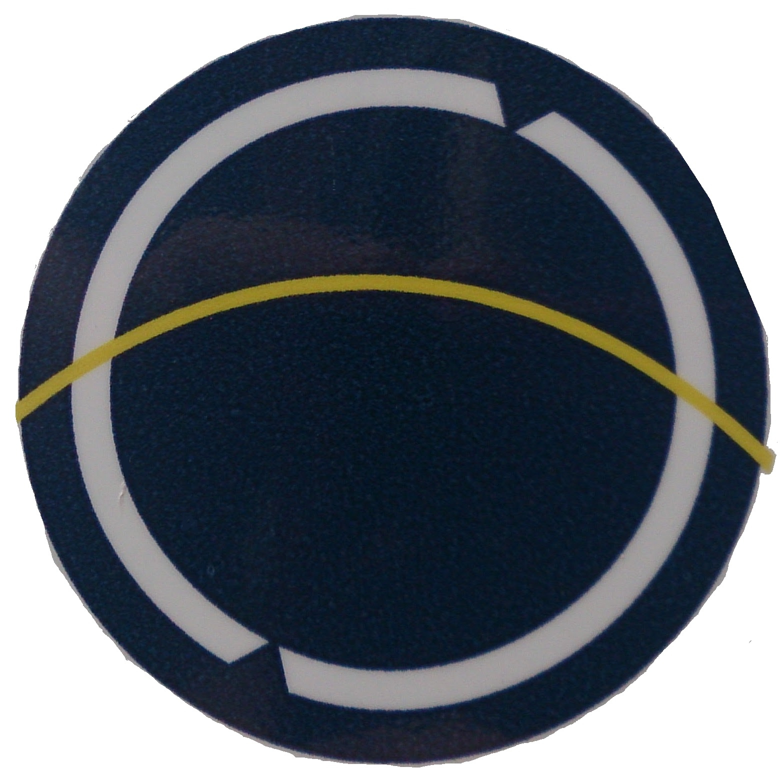 新潟県立国際情報高等学校の校章・魚沼トランスポートのバス停表示板を撮影しました。